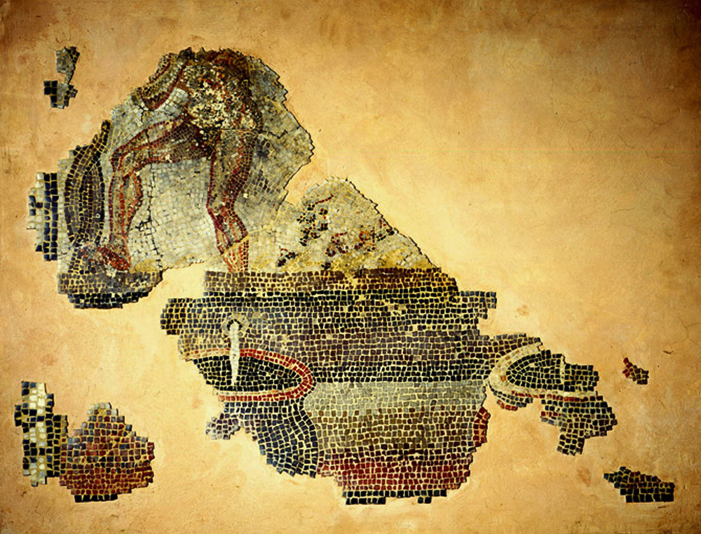 Fragments d’une mosaïque découverte rue Cléberg à Lyon lors des fouilles de sondage précédant l'édification du Musée gallo-romain. Personnage foulant du raisin dont le jus s'écoule dans des jarres. Musée gallo-romain de Lyon-Fourvière. Catalogue archéologique de la Gaule, Lyon 69/2 p. 553